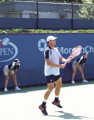 Self Made Photo Of Noam Okun